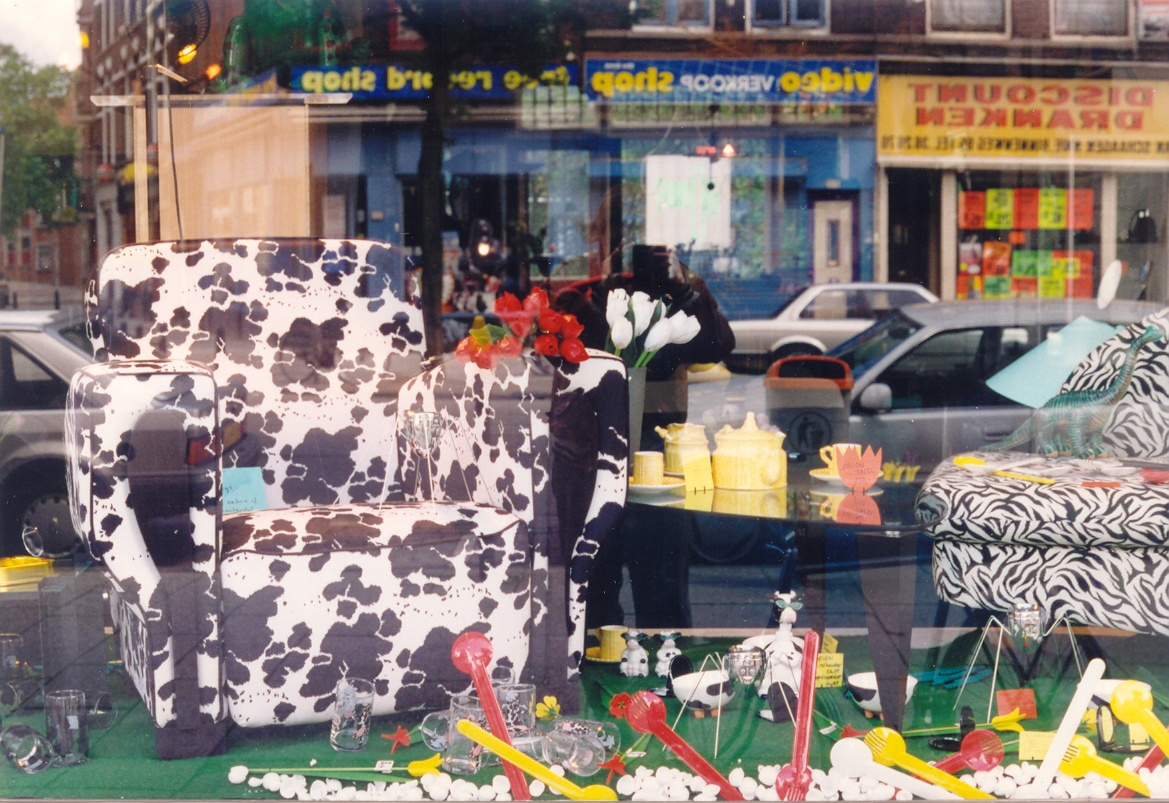 Etalage met designobjecten bij galerie Fabricati op de Nieuwe Binnenweg in Rotterdam met HipHop fauteuil van Peter van Zoetendaal en spinasbakjes van Marcel Douwe Dekker, augustus 1993.